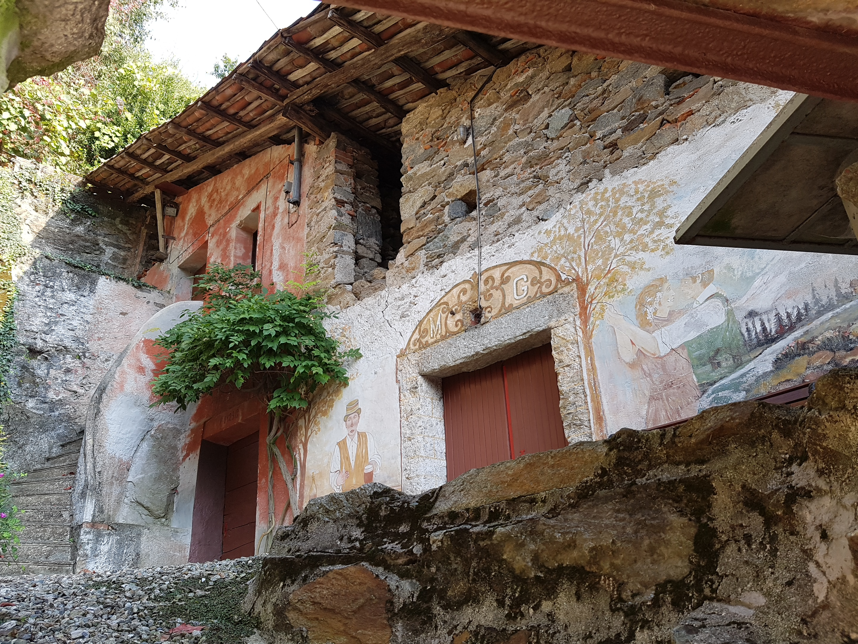 Balmetto, Borgofranco d'Ivrea, Piemonte